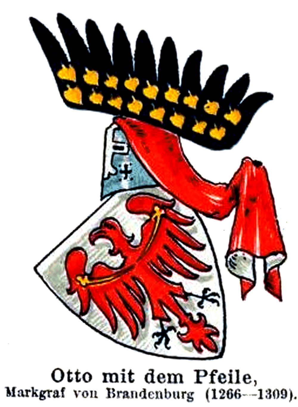 Wappen Otto IV. von Brandenburg „mit dem Pfeil“